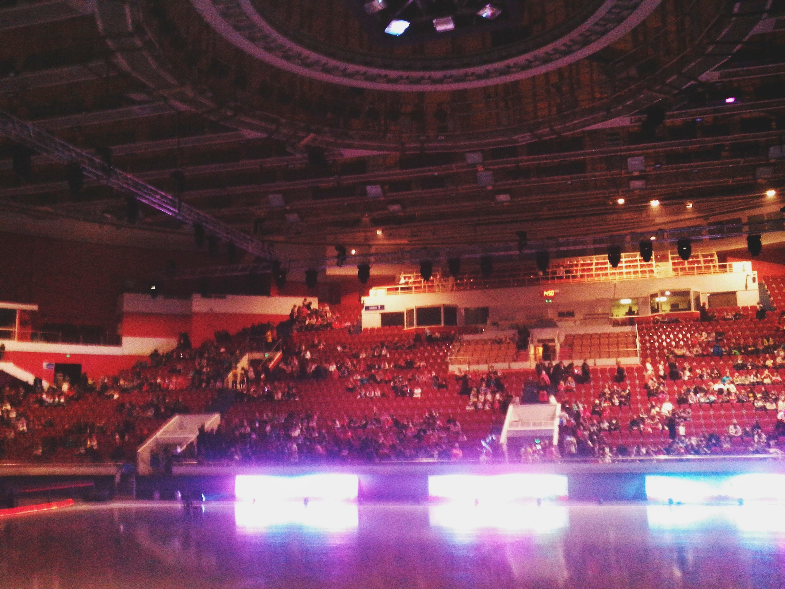 Спортивно-концертный коплекс Юбилйный. Г. Санкт-Петербург